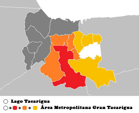 Area Metropolitana Gran Tacarigua